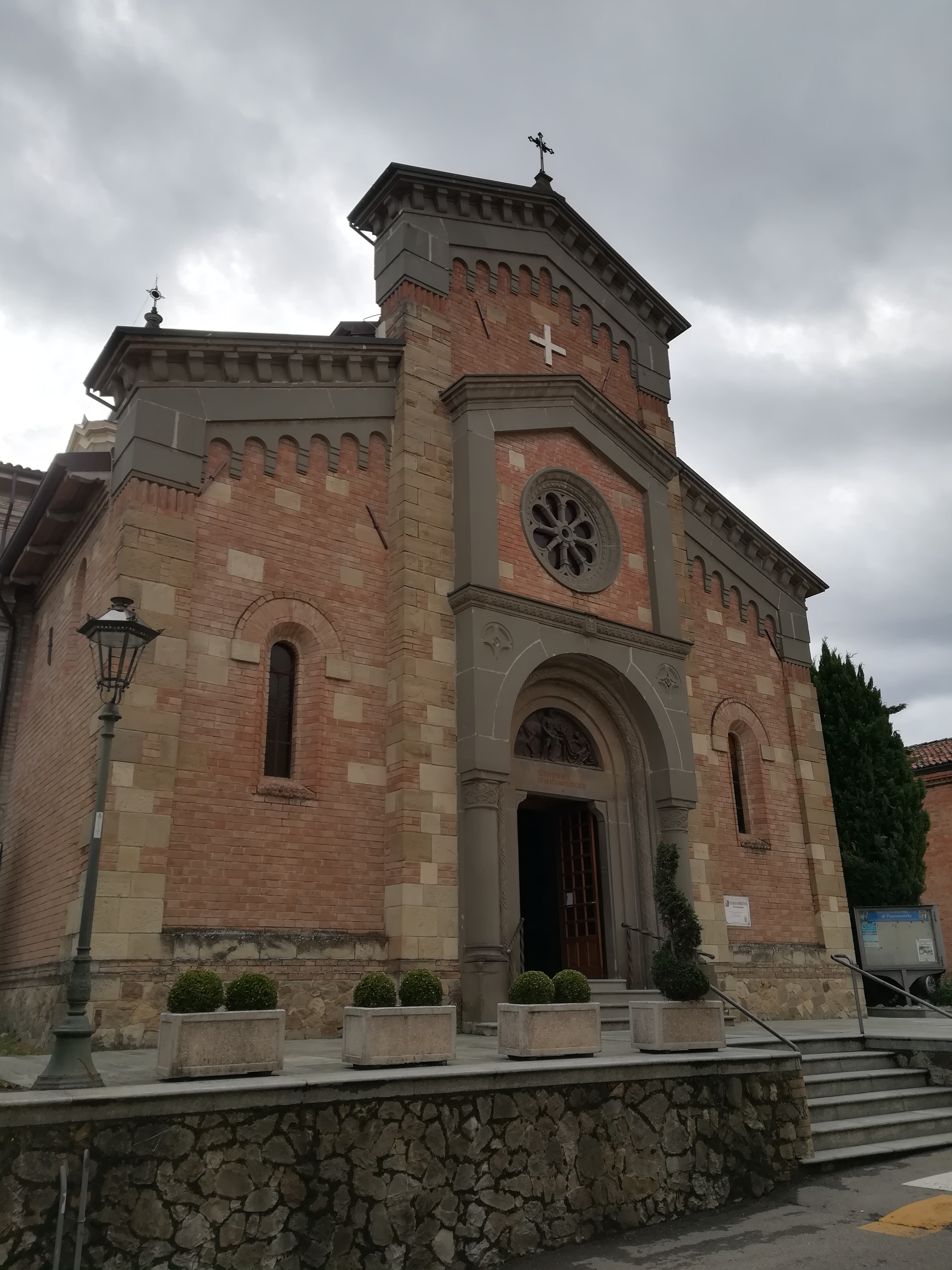 Traversetolo